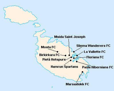 Répartition des clubs de Premier League Maltaise 2005-2006.